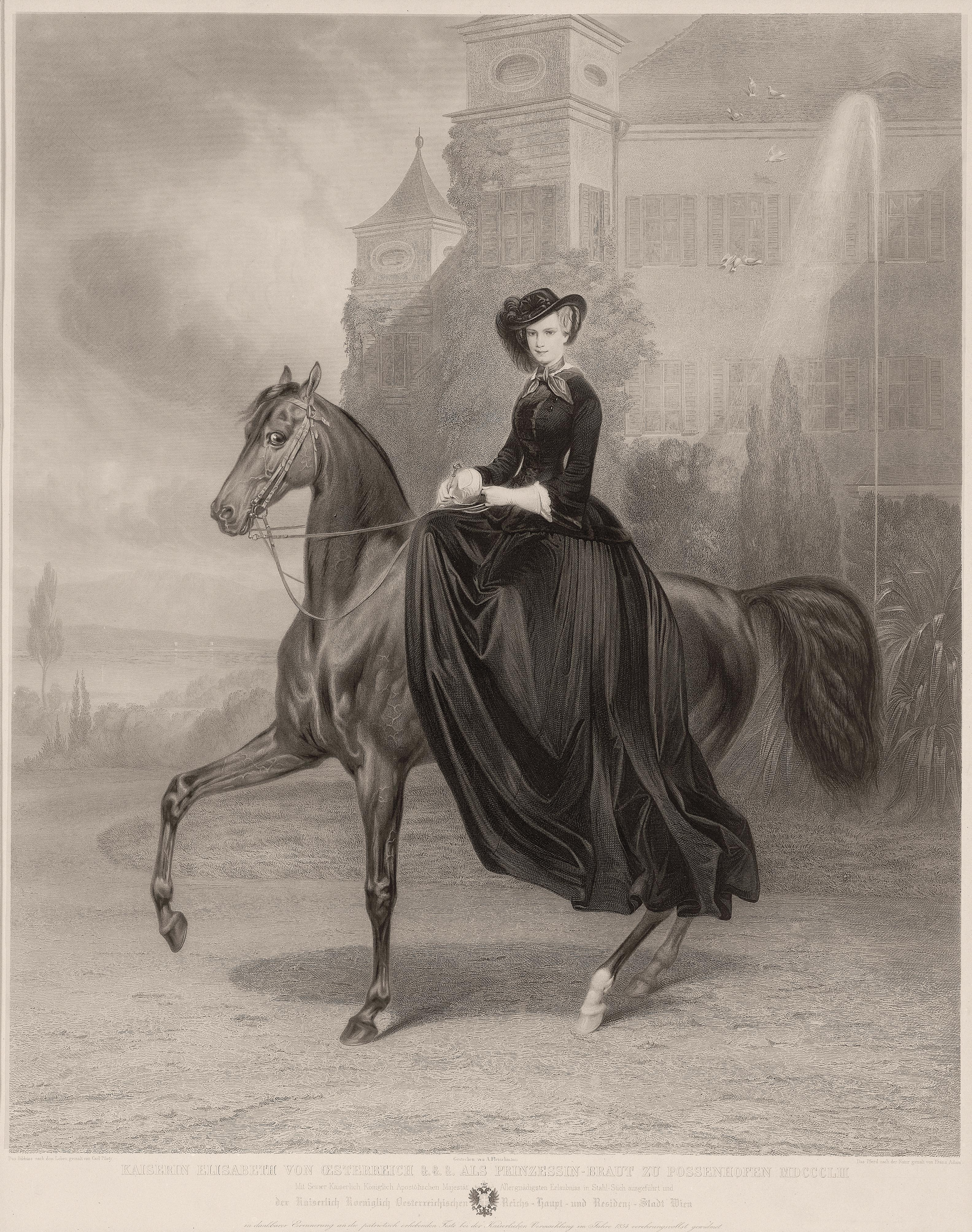 Kaiserin Elisabeth von Österreich als Braut vor Possenhofen 1853, Stahlstich von A. Fleischmann nach einem Gemälde von Carl Piloty und Franz Adam, Königlich bayrische Kunstanstalt von Piloty und Loehle München, 62 x 51 cm